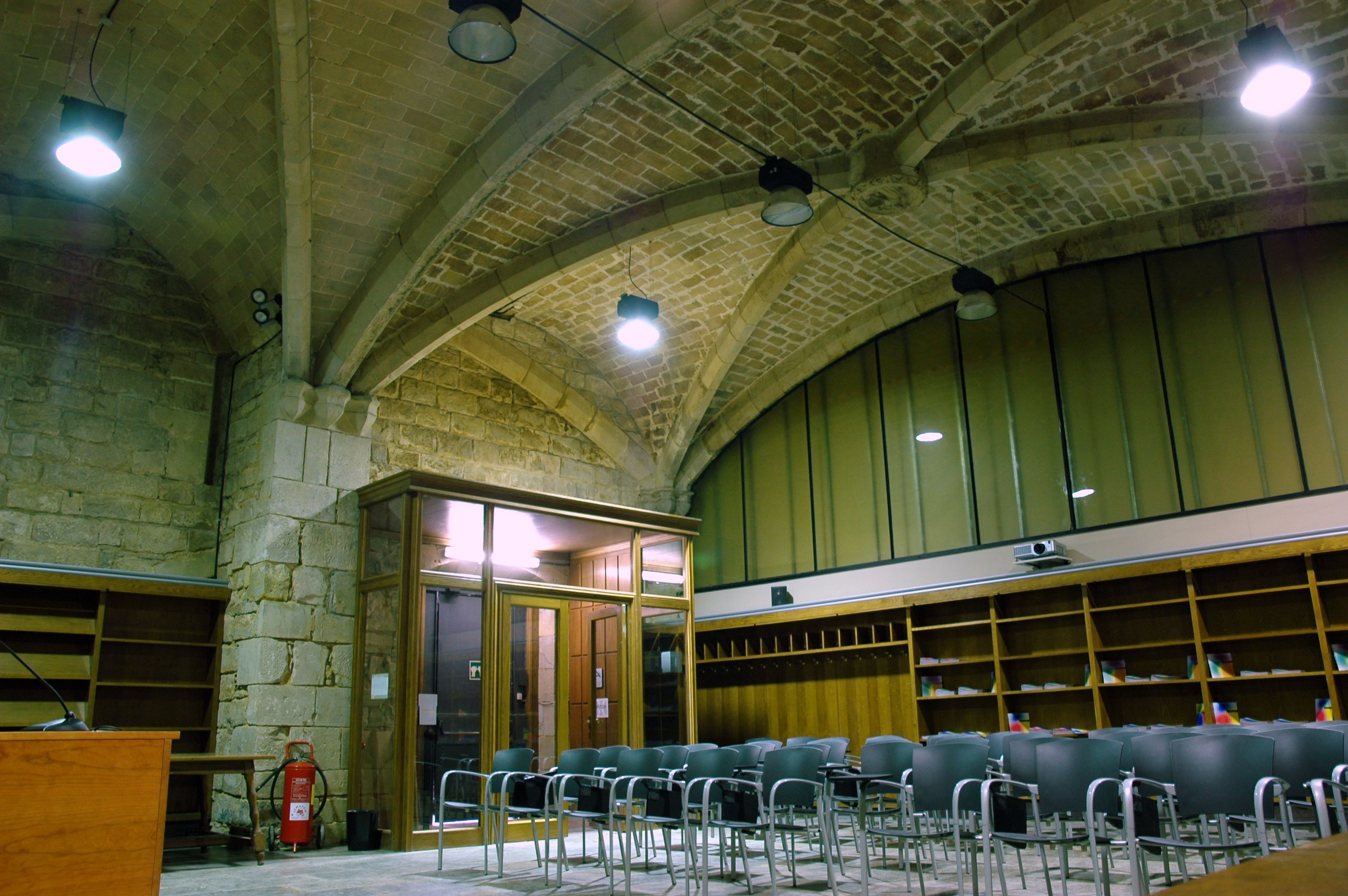 Biblioteca de Catalunya - Sala viquitrobada